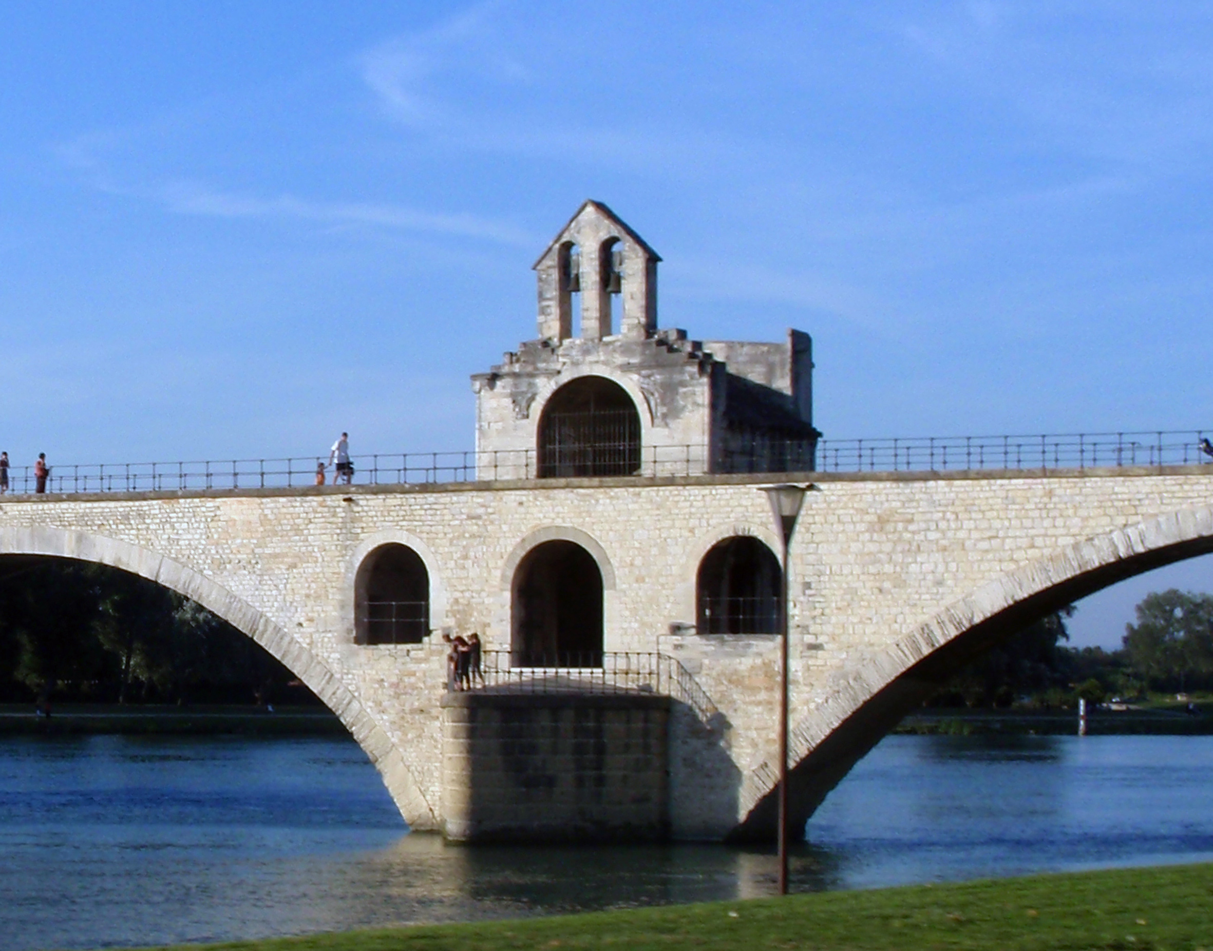 Chapelle saint-Nicolas, Avignon, Vaucluse, France.